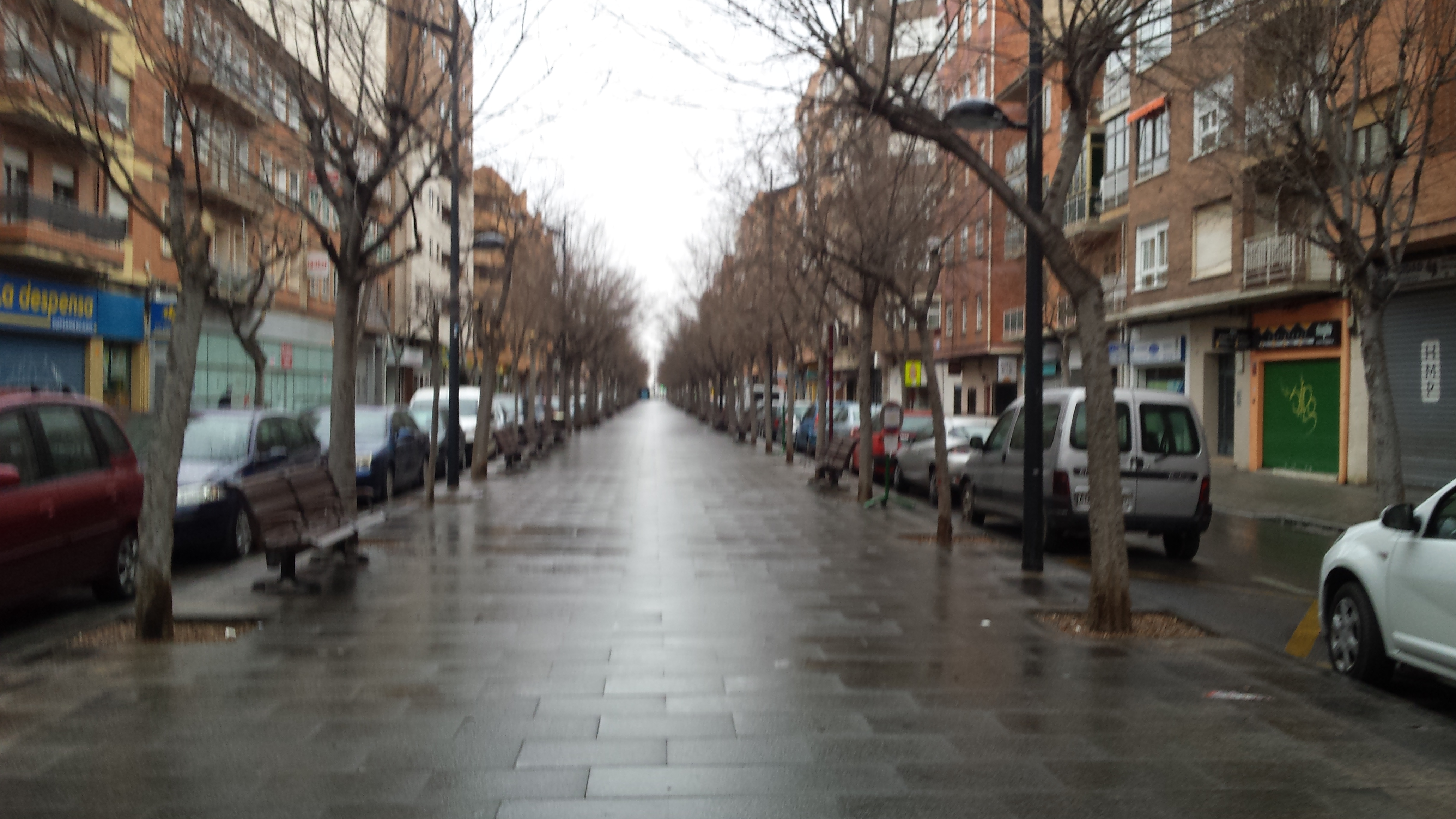 Albacete